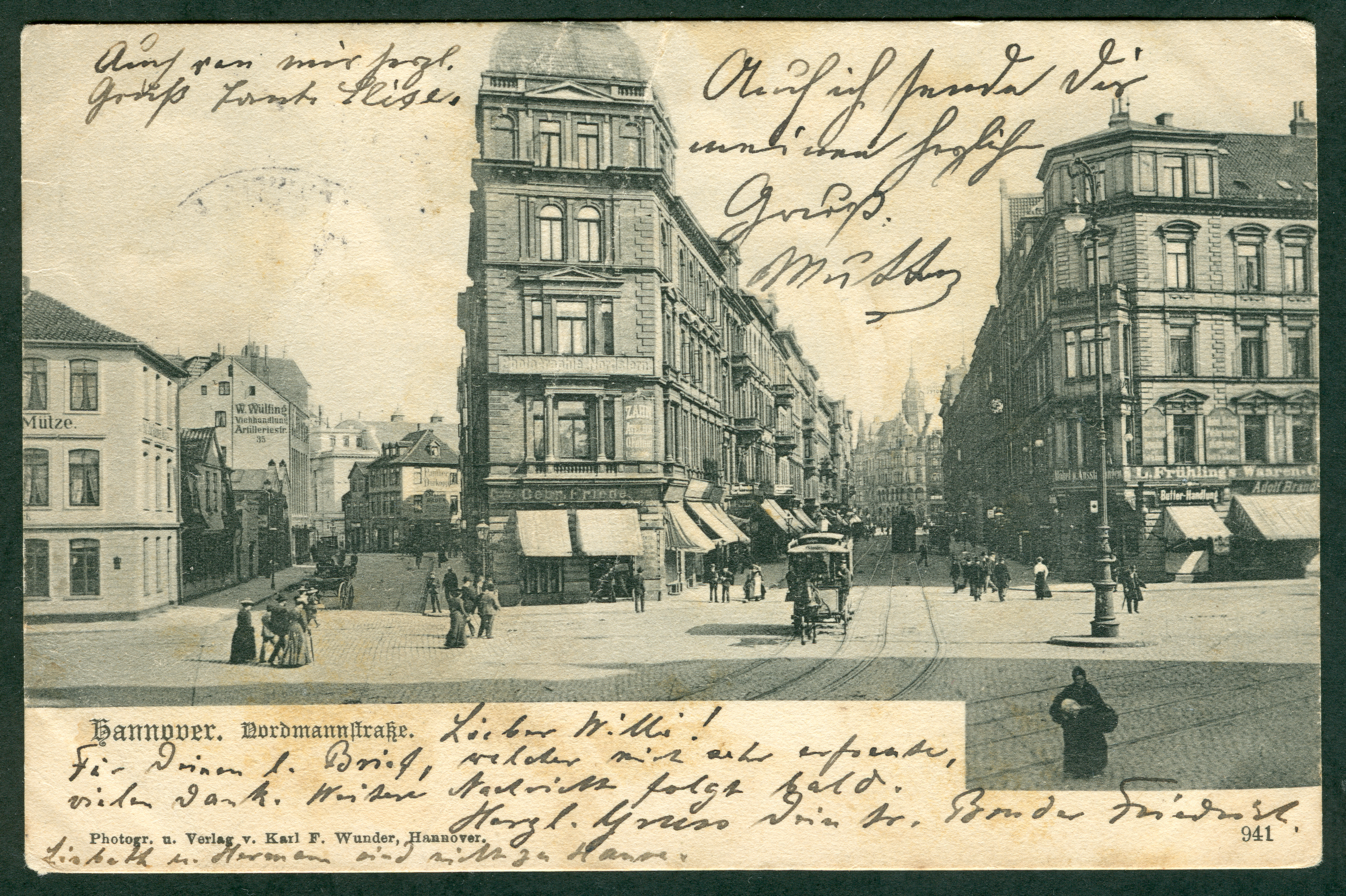 Bildmotiv der Ansichtspostkarte von Karl F. Wunder. Auf dem Haus in der Bildmitte ist auf der Schmalseite das Firmenschild "Photographie Nordstern" zu sehen. Ungeklärt ist noch, ob es sich bei dem abgebildeten, von einem Pferd gezogenen Beförderungsmittel um eine Pferdestraßenbahn oder um einen Pferdeomnibus handelte. In der Vergrößerung ist deutlich zu erkennen, daß die Räder des Gefährts in der Führung der Straßenbahnschienen laufen.